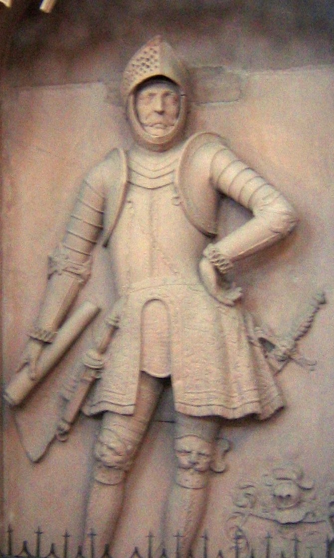 Berthold III. von Zähringen (* um 1085/1095; † 3. Dezember 1122), Relief im Chor des Freiburger Münsters